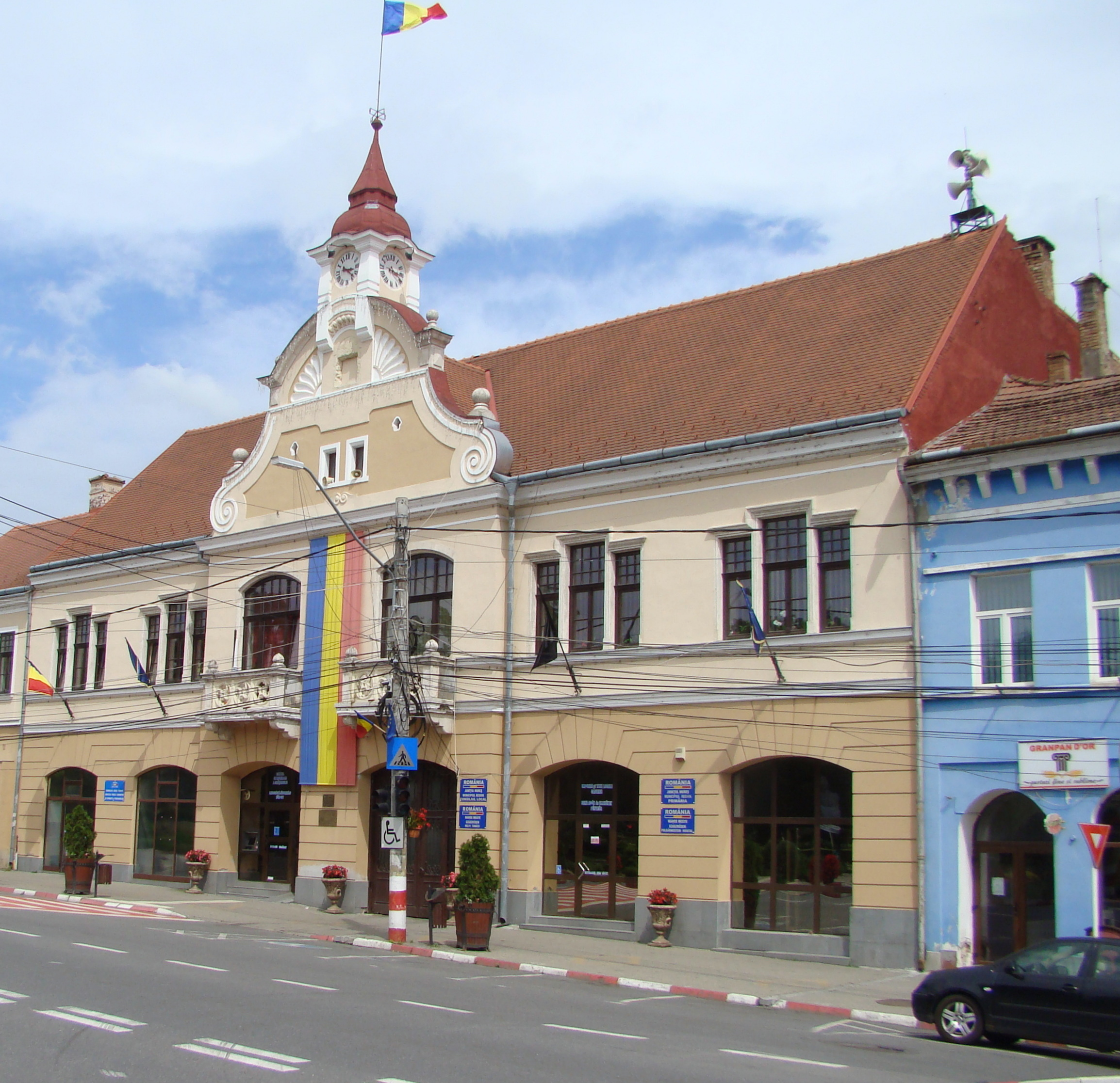 Ansamblul urban „Str. Petru Maior”, municipiul Reghin, str. Petru Maior de la nr. 4-55